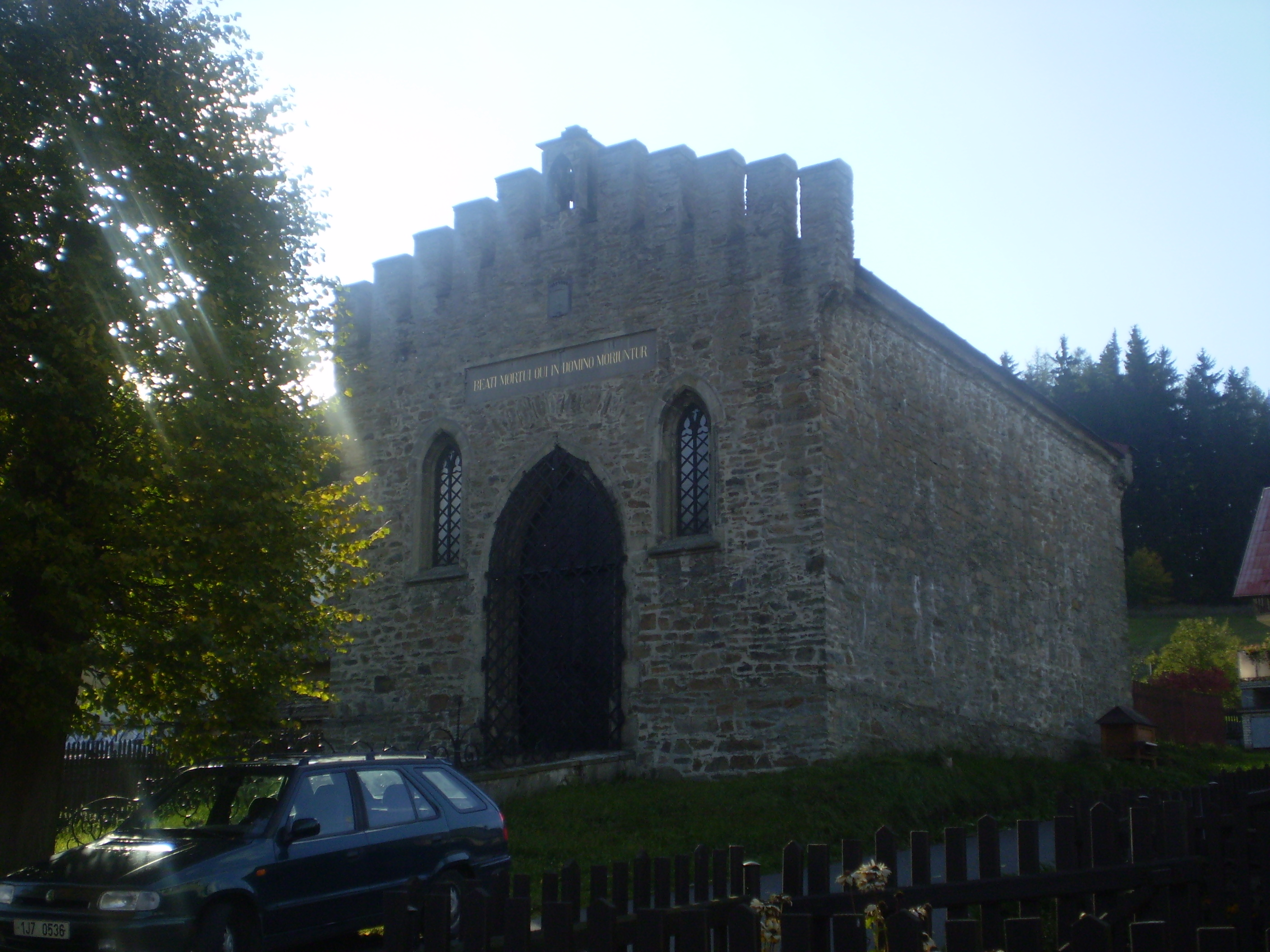 Hrobka rodu Belcredi